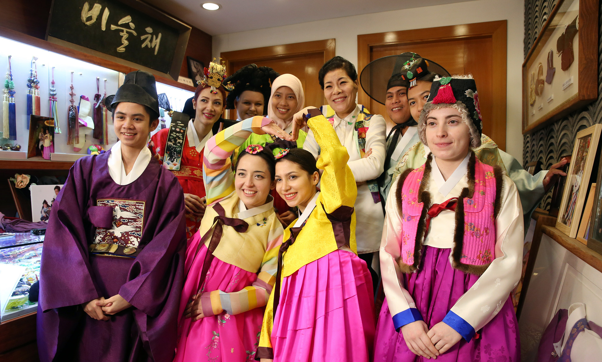 박술녀 한복 체험